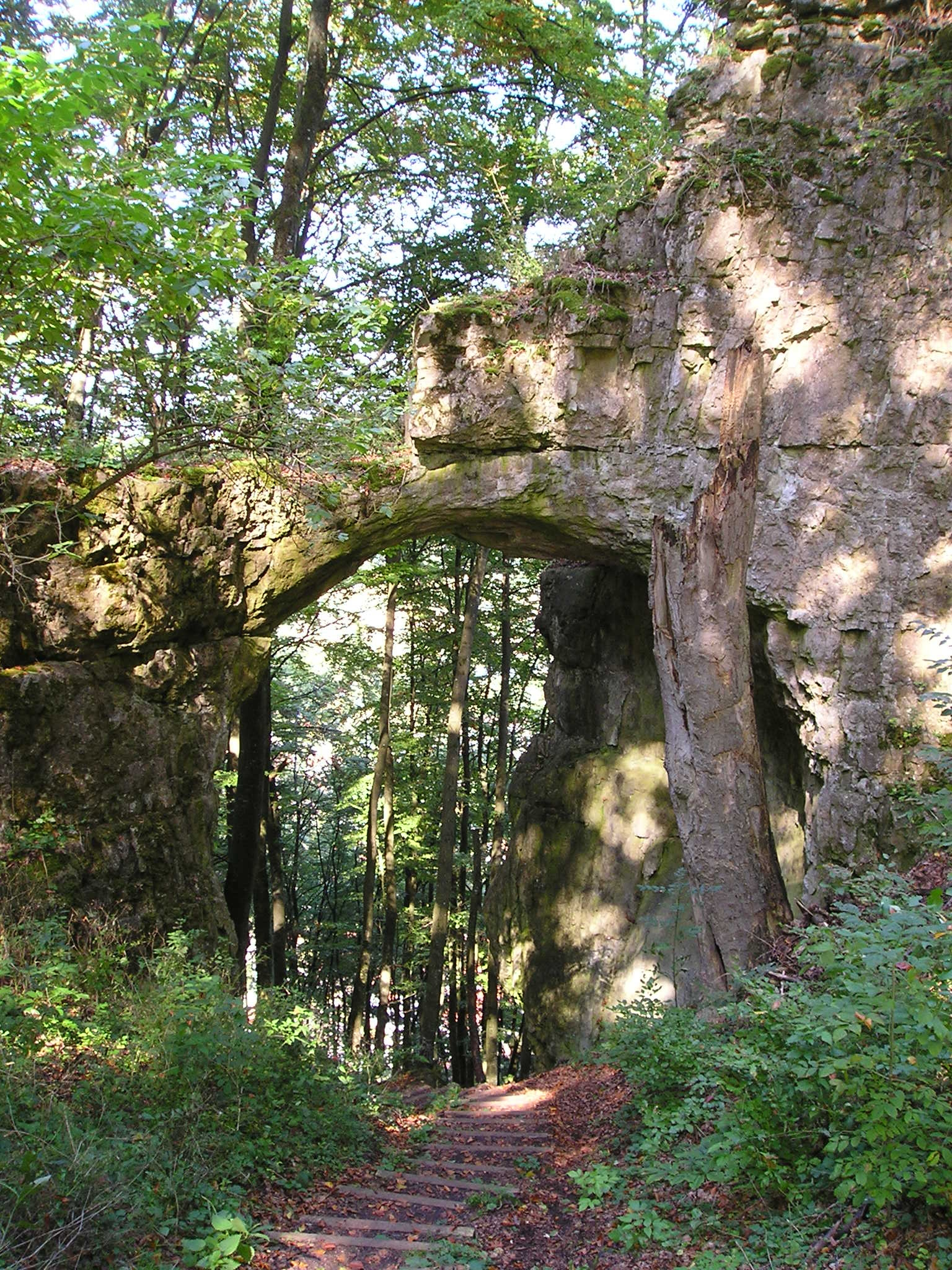 Felsentor oberhalb von Unteremmendorf im Altmühltal